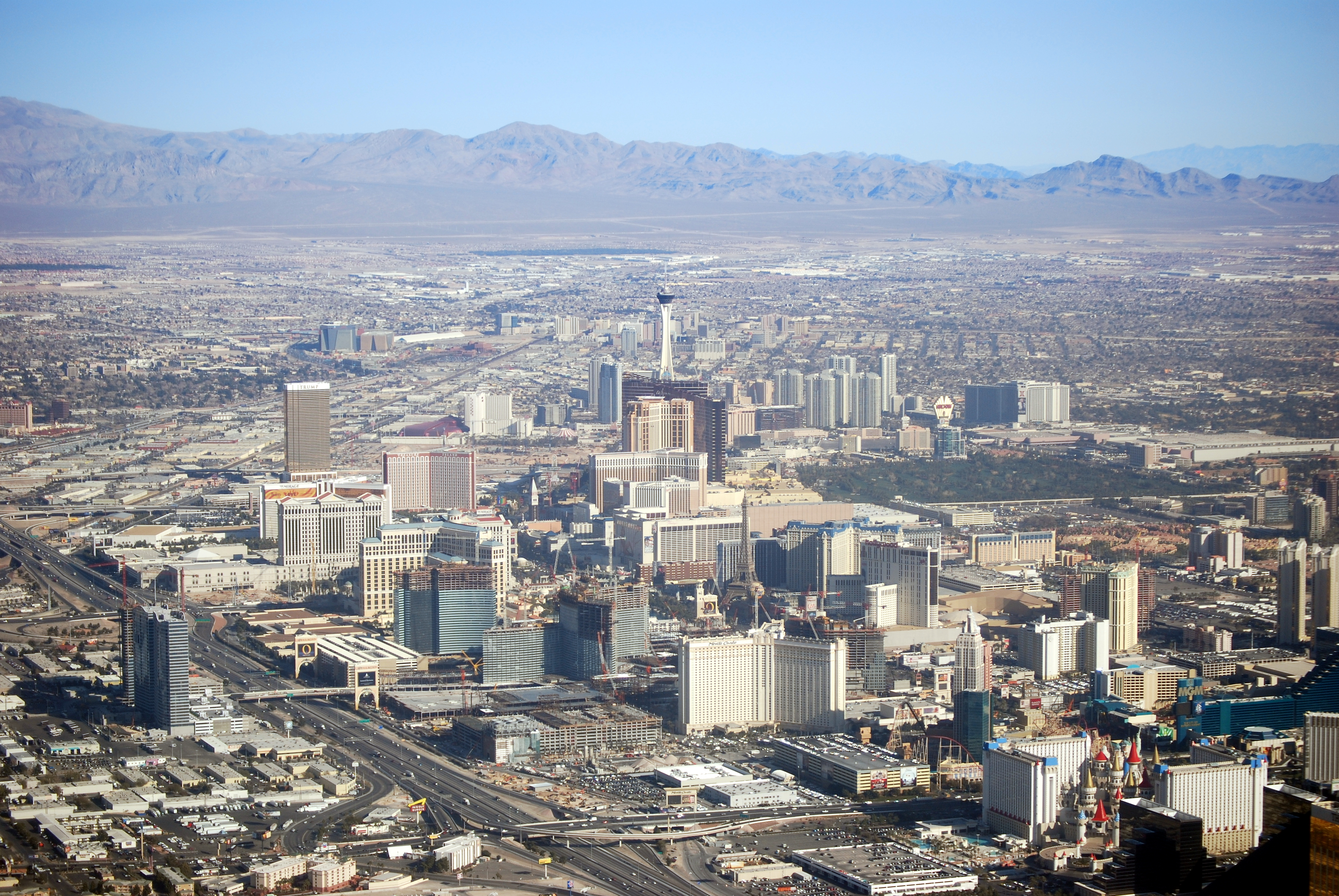 Departure Shot